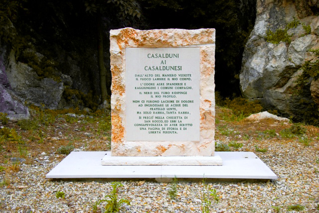 Casalduni è tristemente nota, insieme alla vicina Pontelandolfo, per gli eccidi compiuti dalle truppe sabaude dal 12 al 14 agosto 1861. Un battaglione di 500 bersaglieri comandati dal colonnello Gaetano Negri, divenuto poi sindaco di Milano, massacrò centinaia di cittadini e distrusse i due paesi incendiandoli. Molte donne furono stuprate prima di esser assassinate. Si cercò di nascondere l'eccidio bruciando ed occultando i cadaveri. Una lapide in prossimità del castello ricorda uno dei luoghi dell'eccidio.